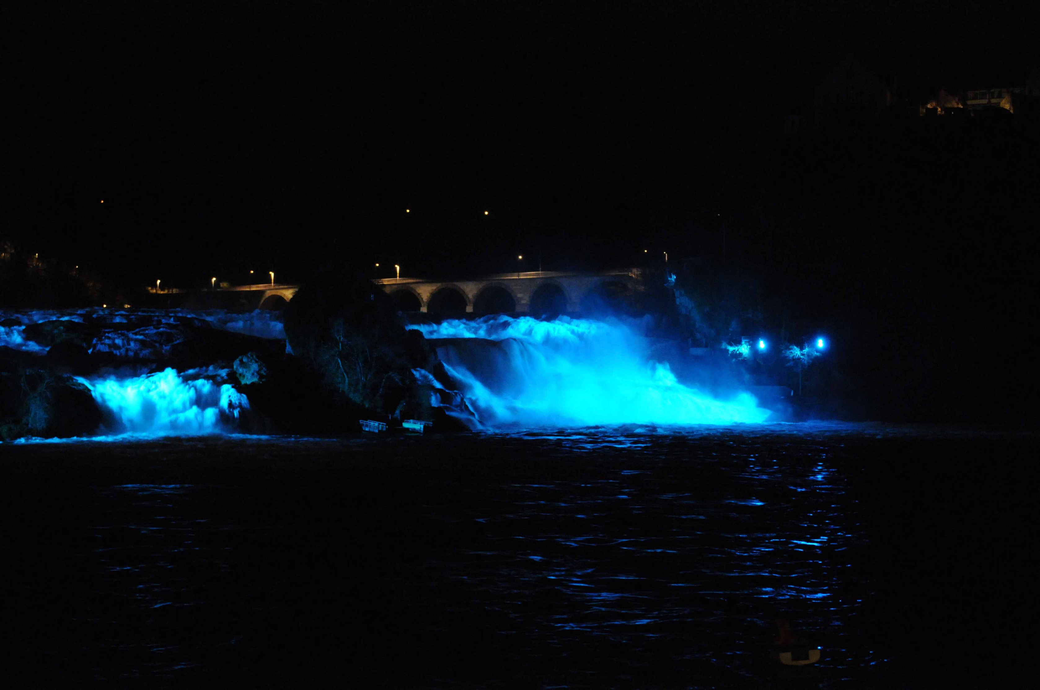 Die Rheinfallbeleuchtung von der EKS